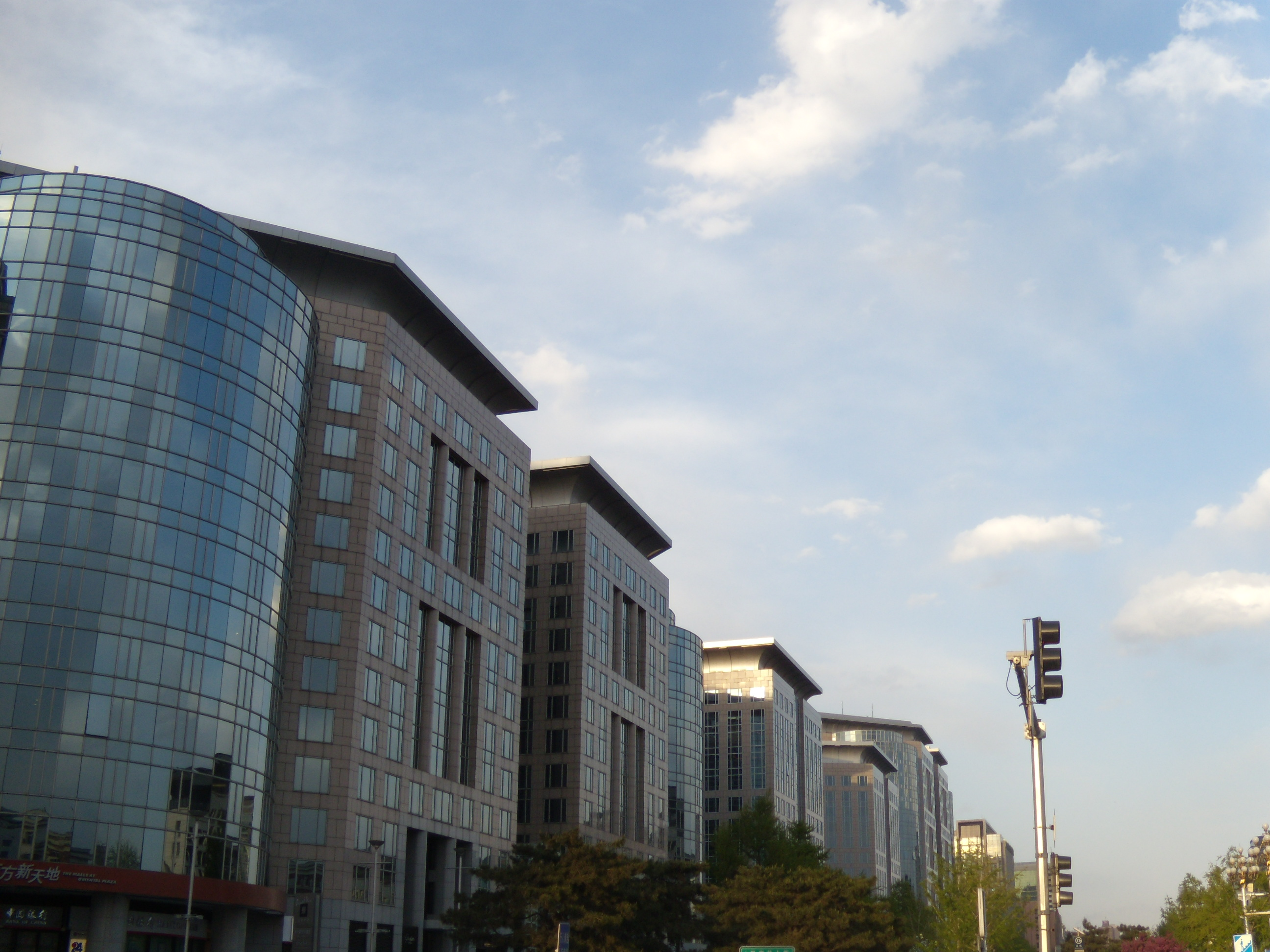 东方广场